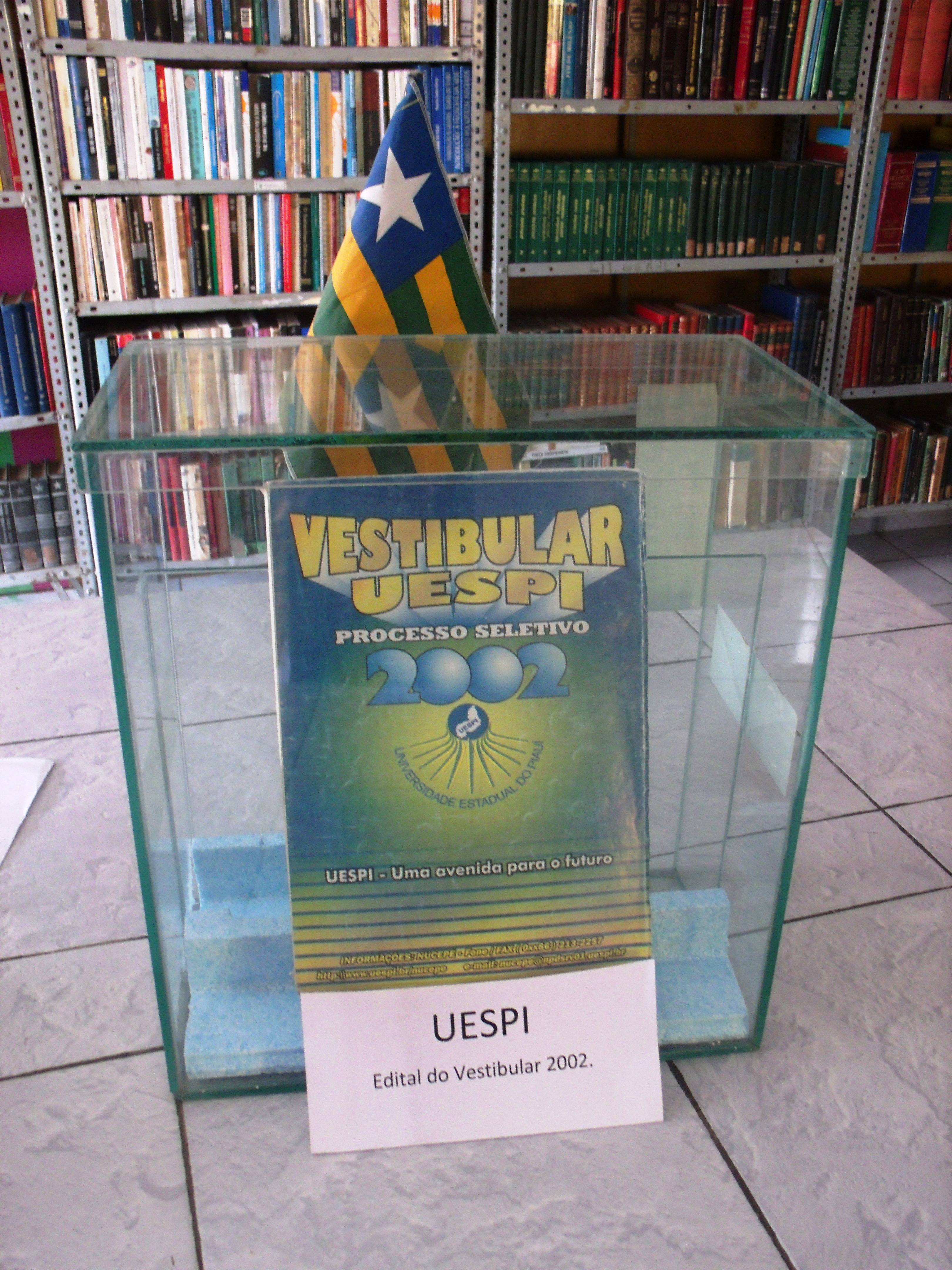 Exposição sobre a Universidade Estadual do Piauí, o edita do vestibular 2002 da referida instituição, no detalhe, a bandeira do Piauí.